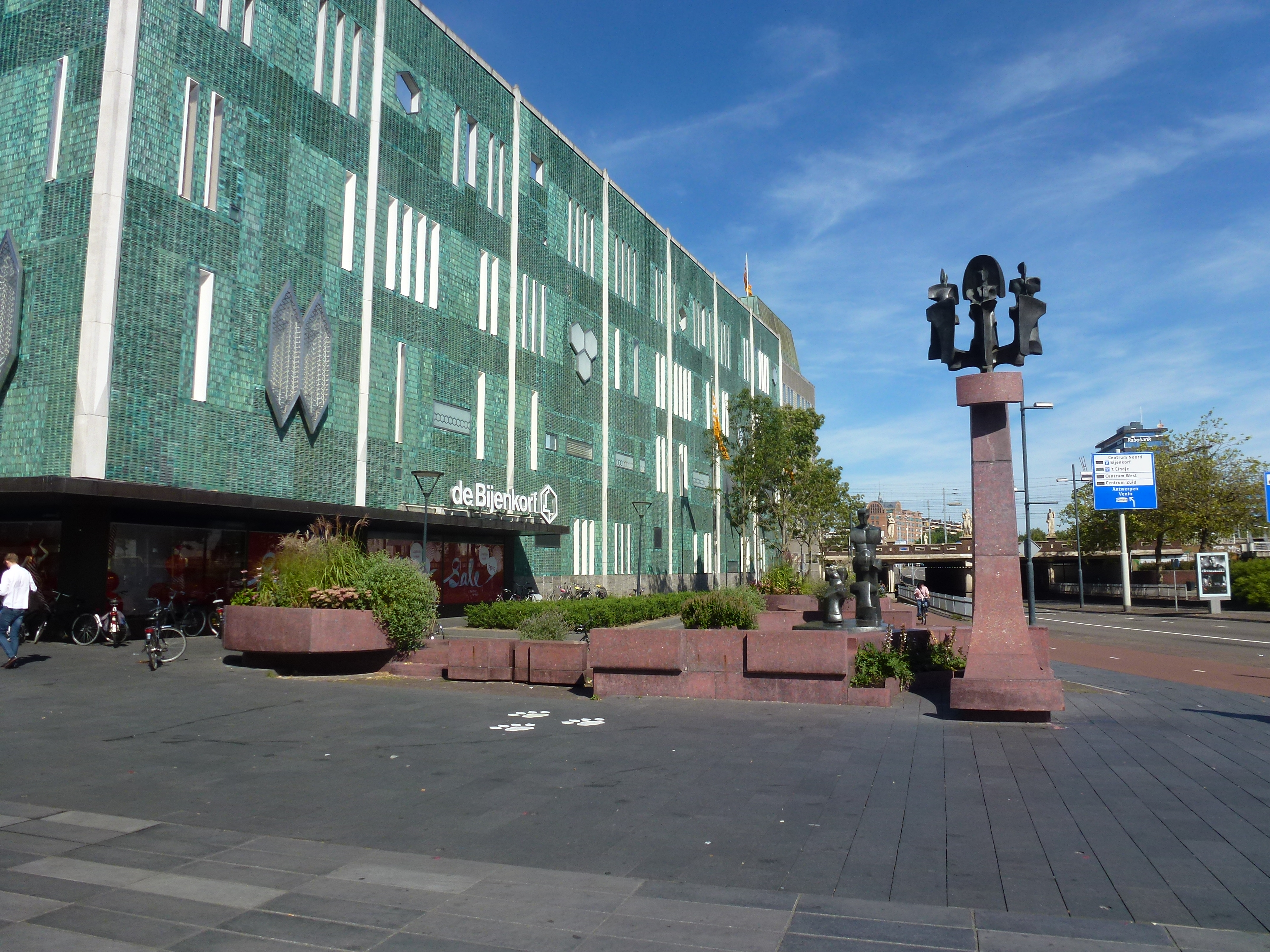 Figurengroep, Twee Figuren en pleinaanleg van Mario Negri, Stationsplein Eindhoven naast De Bijenkorf Eindhoven